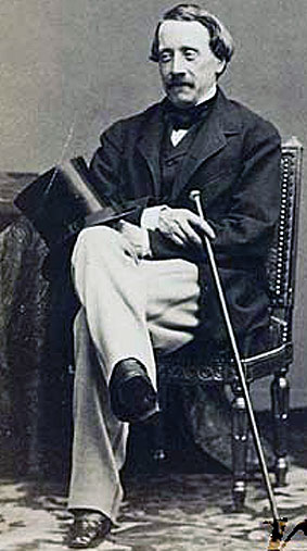 Frederik Lodewijk Willem de Kock